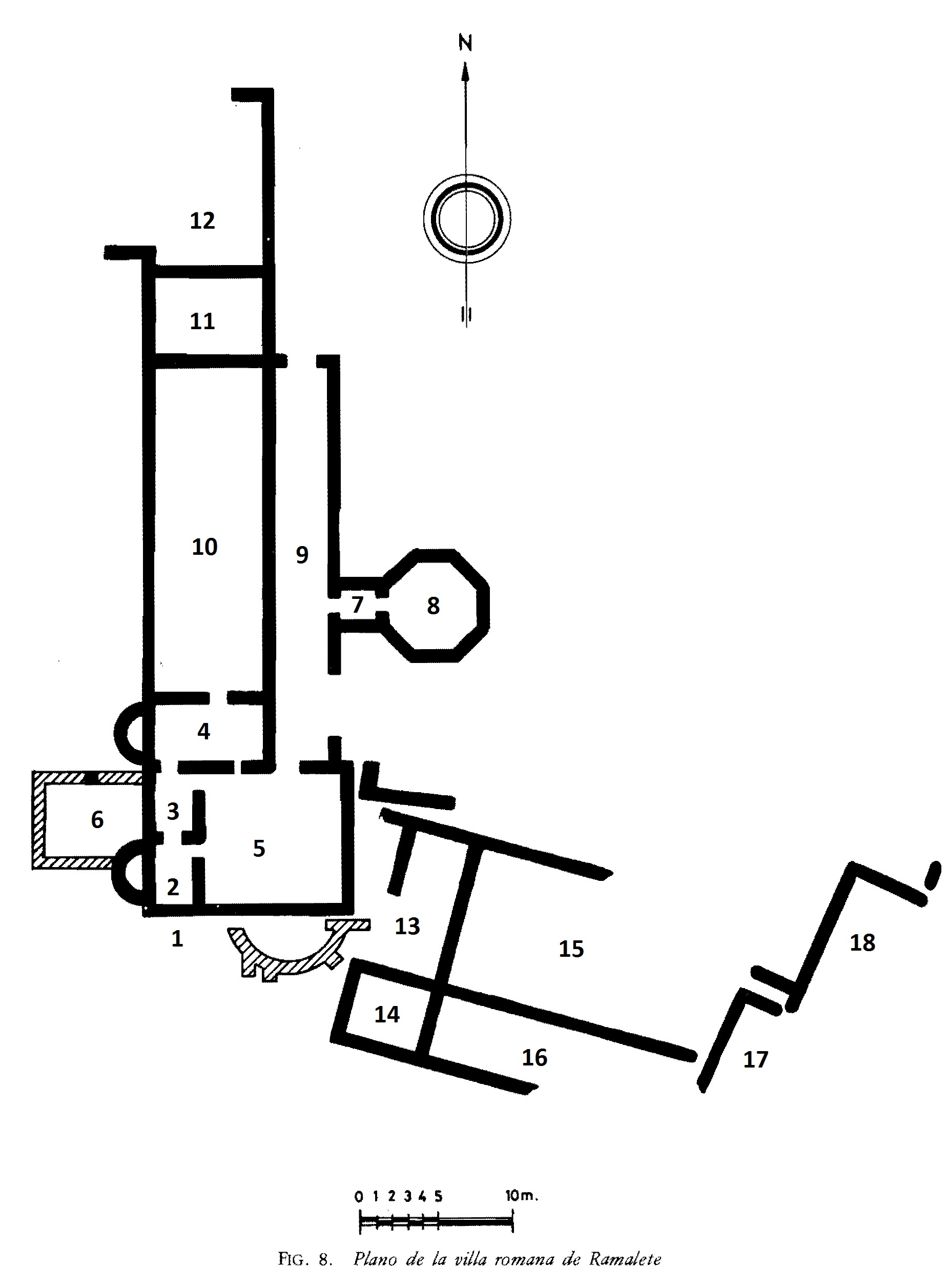 Plano de la villa del Ramalete